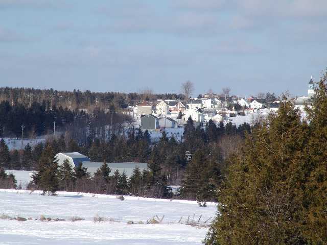 Vue du village de Sainte-Cécile-de-Whitton en ski de fond